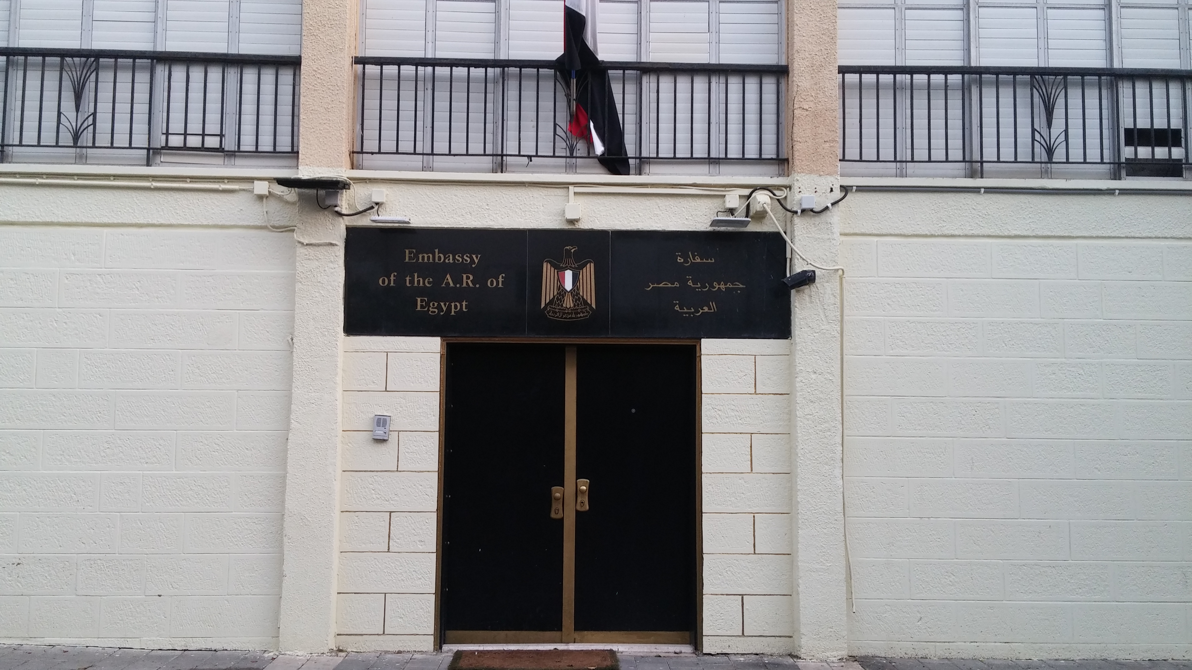 שגרירות מצרים. בזל 54, תל אביב, ישראל